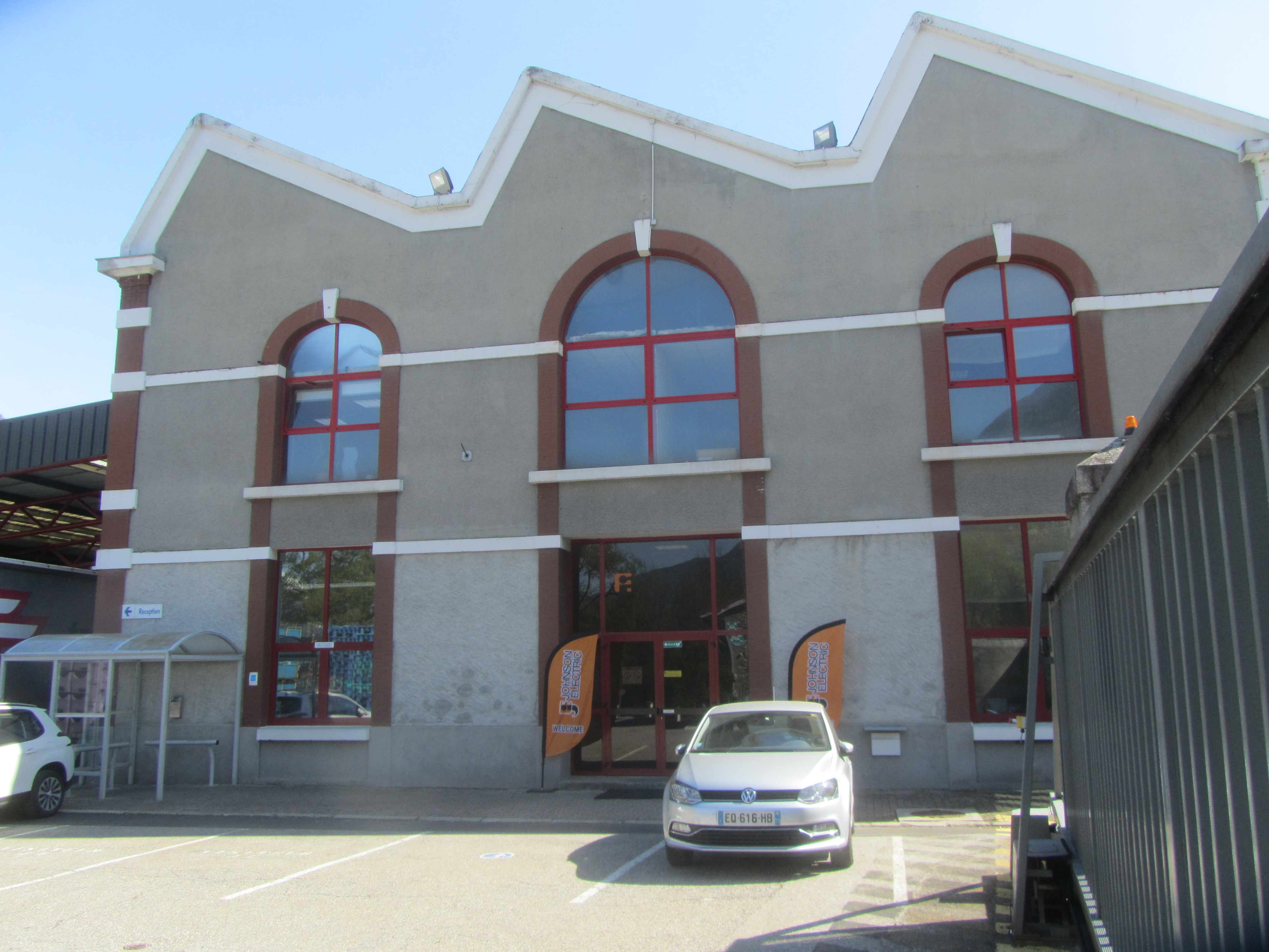 Bâtiments en sheds des établissements industriels anciens de la tréfilerie.